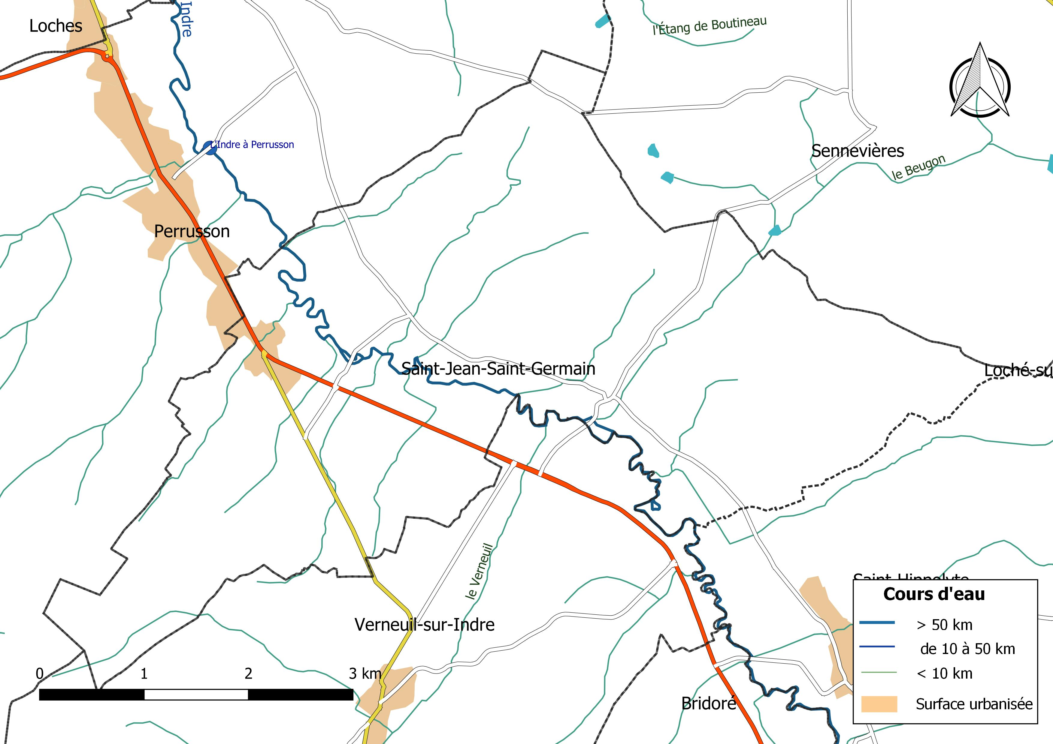 Carte du réseau hydrographique de la commune de Saint-Jean-Saint-Germain (France).